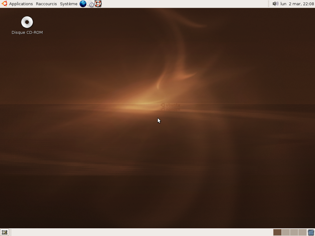 Premier écrans après Installation